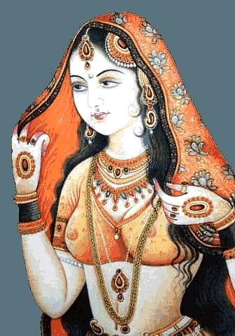 Choli art